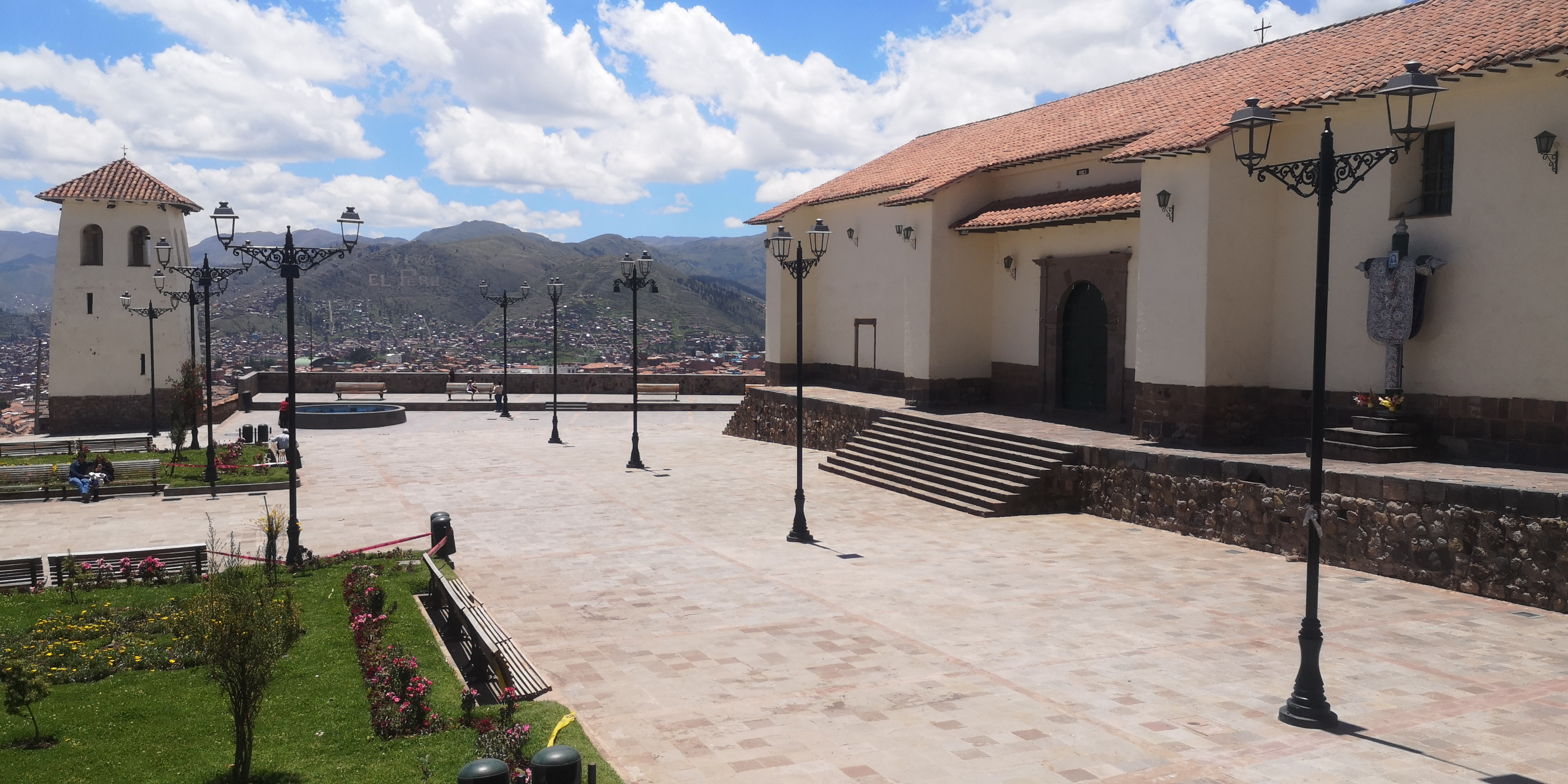 Vista de la iglesia y plazoleta de Santa Ana, Cusco, Perú